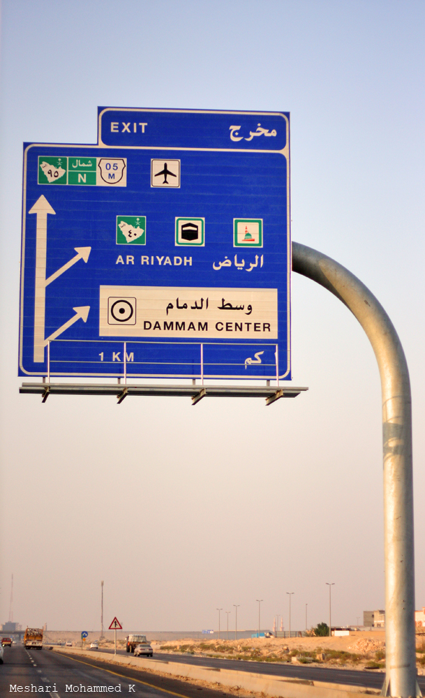 وَمَـا حُـبُّ الدِّيَـارِ شَغَفْـنَ قَلْبِـي ،، ولَكِـنْ حُـبُّ مَنْ سَكَـنَ الدِّيَـارَا ..، محاوله لمجارات بعض الصور في تصوير لوحات الطرق =)